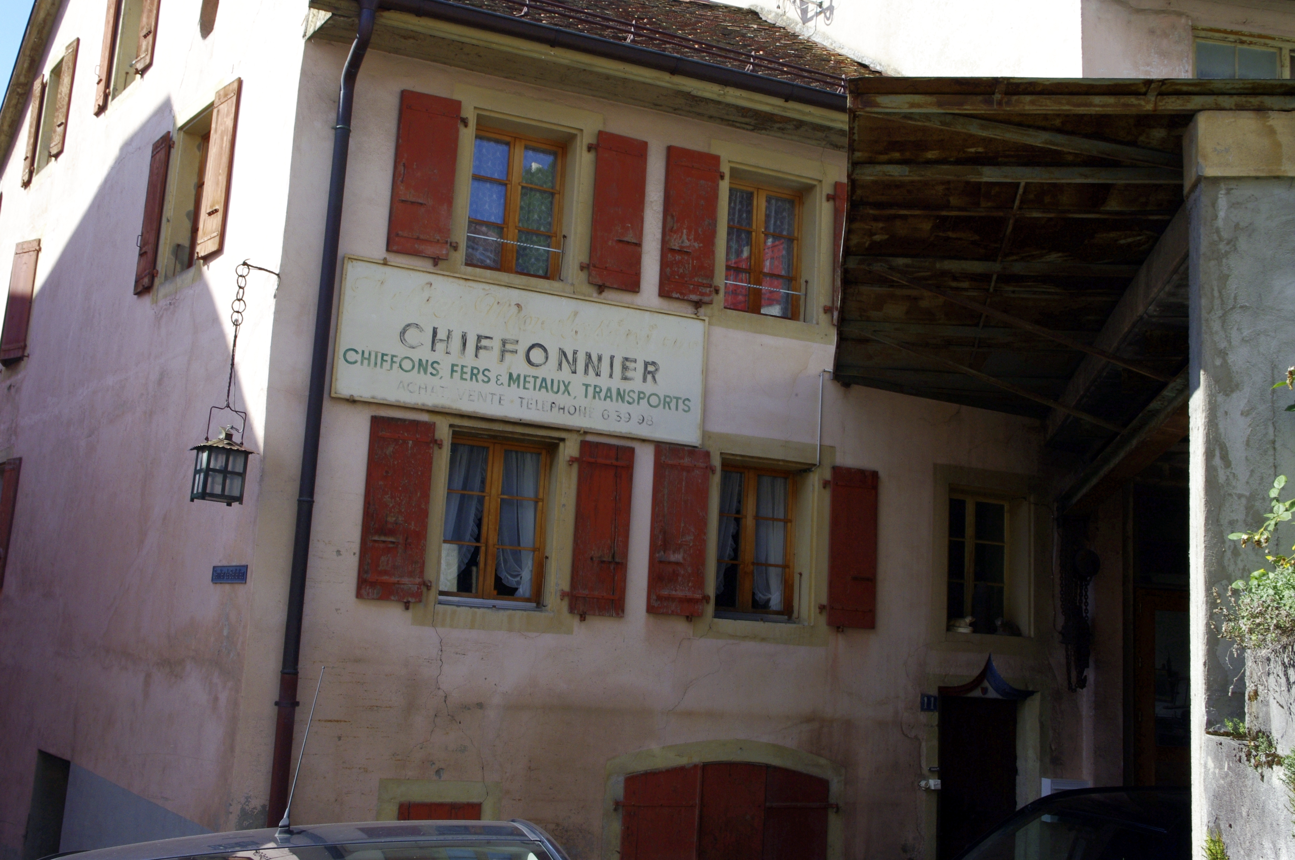 Maison à Montreux avec une ancienne affiche Chiffonnier, chiffons, fer & méteaux, transports, achat, vente, telephone